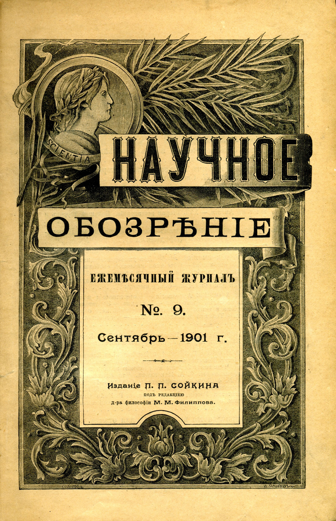 Обложка журнала "Научное обозрение", 1901, №9